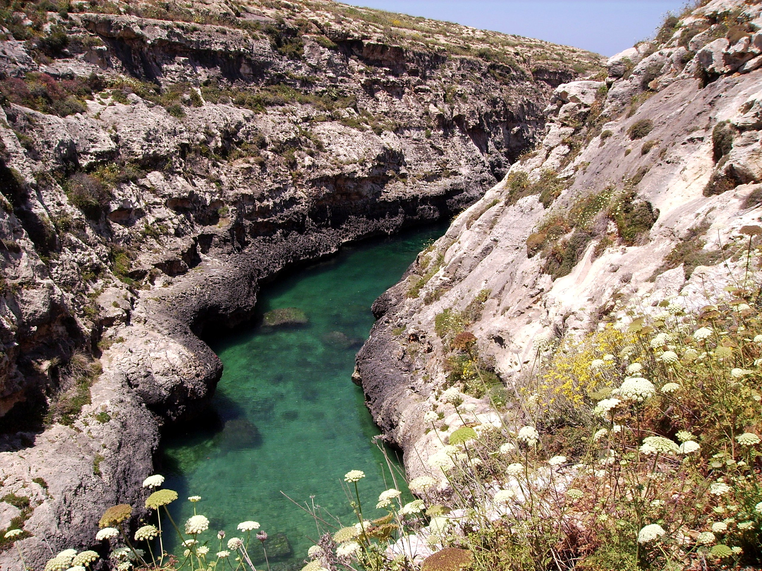 Ghasri Valley Seeseite